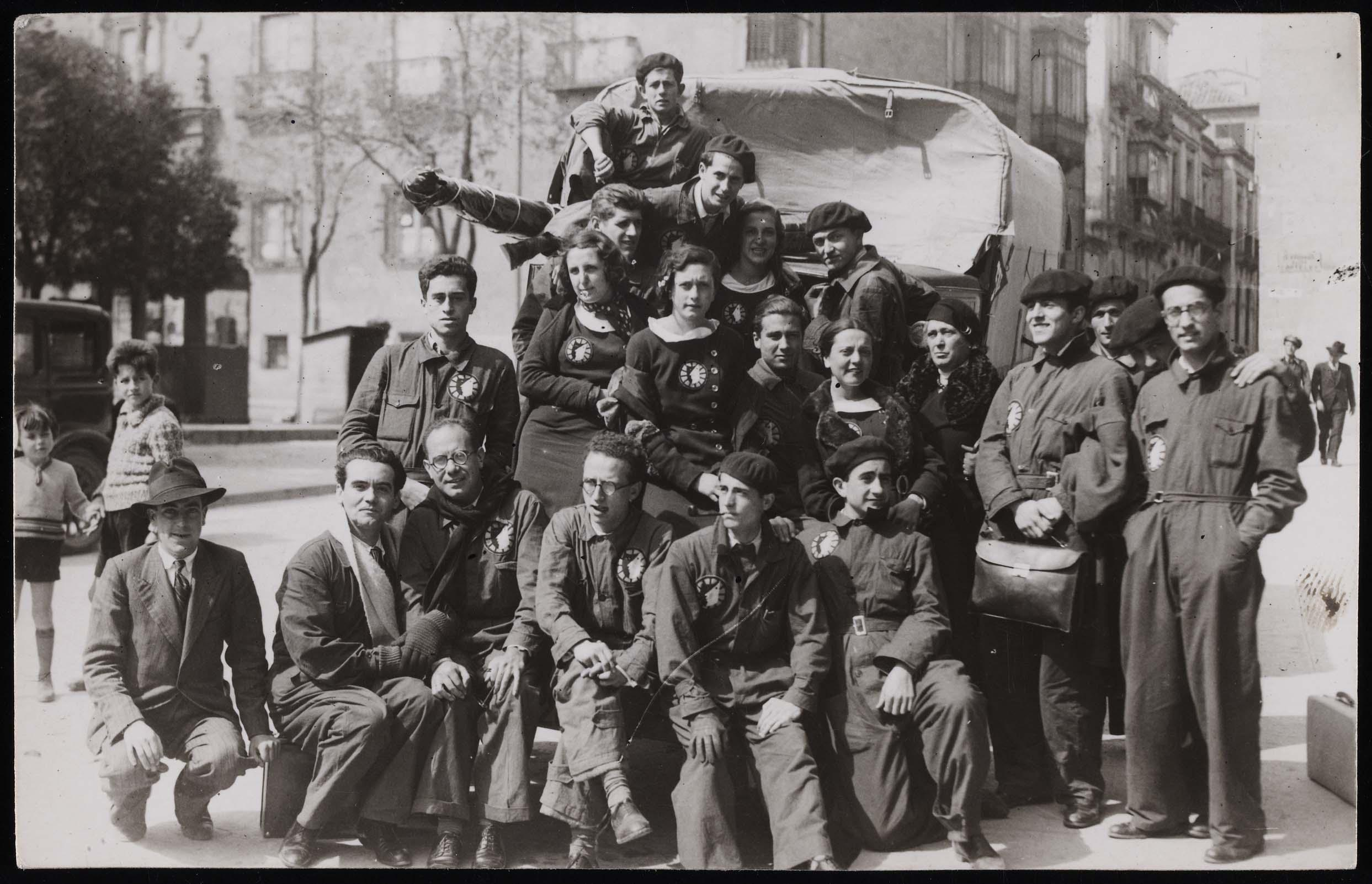 Componentes de La Barraca (1933). Fotografía anónima. Colección del Museo Nacional Centro de Arte Reina Sofía, Madrid, España